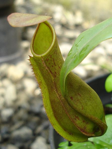 N. albomarginata x reinwardtiana